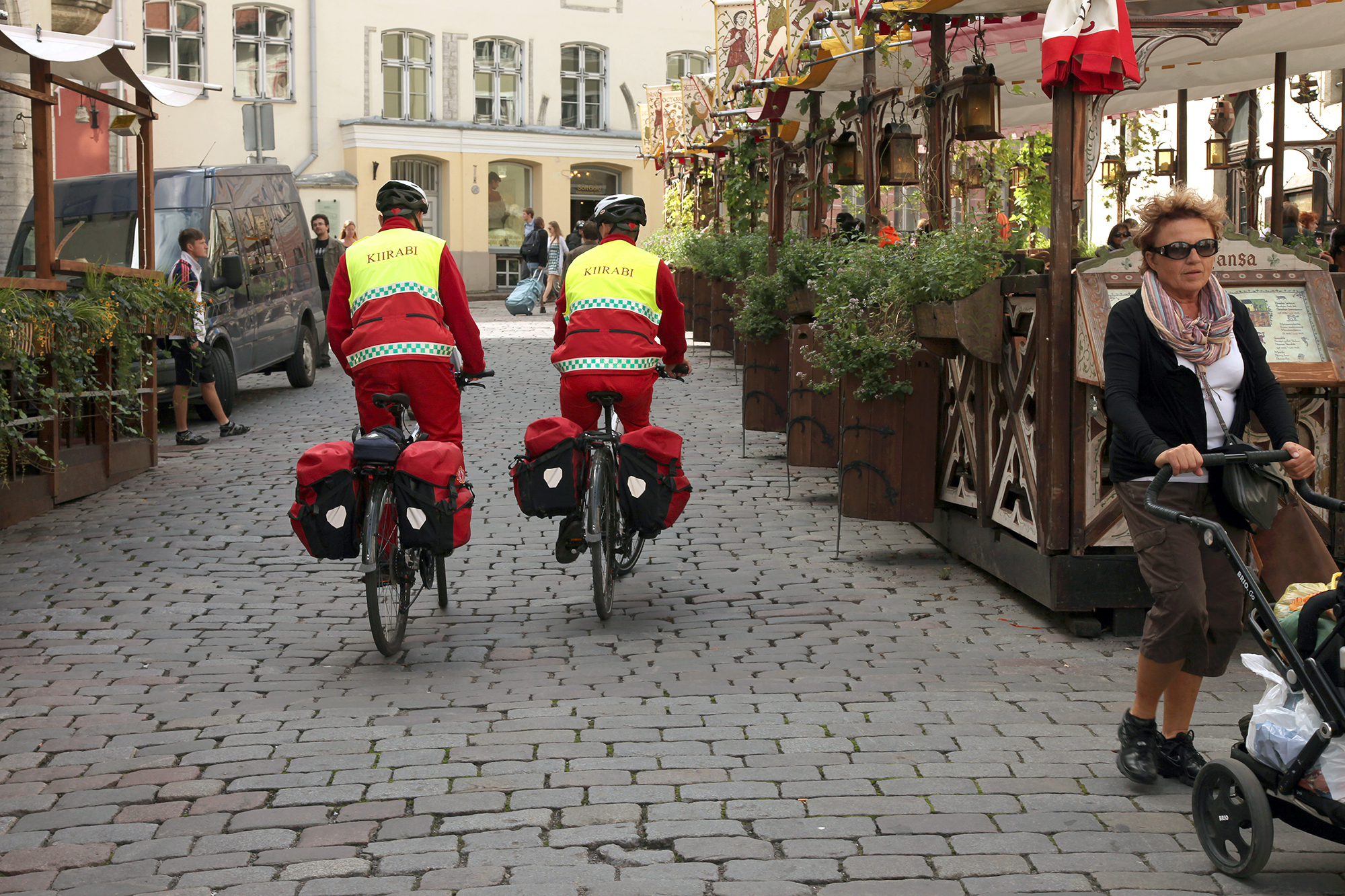 Kiirabi Tallinna vanalinnas 2010